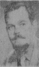 Arkitekten Gunnar Myrstrand